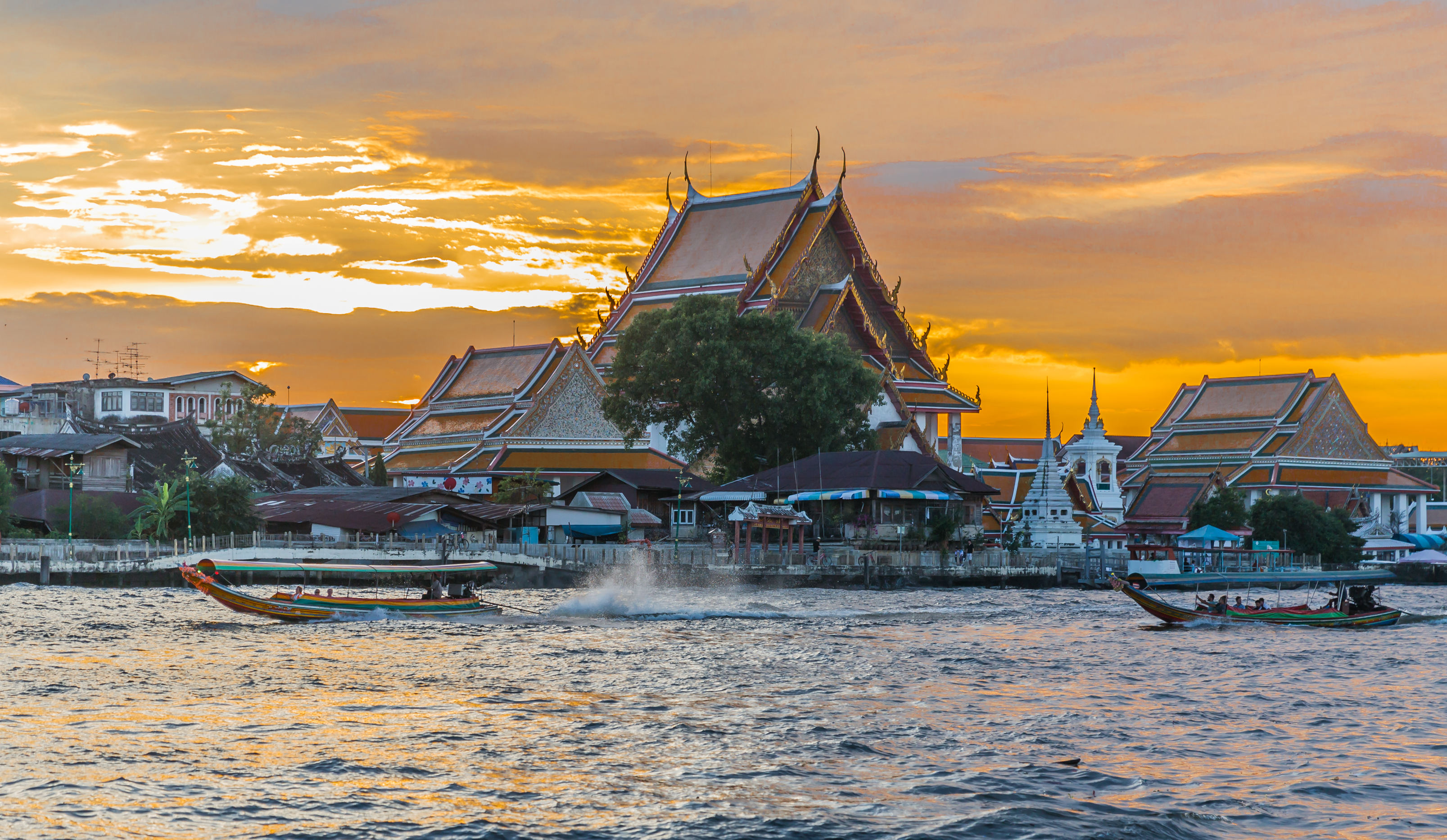 Chao Phraya River, Bangkok, Thailand